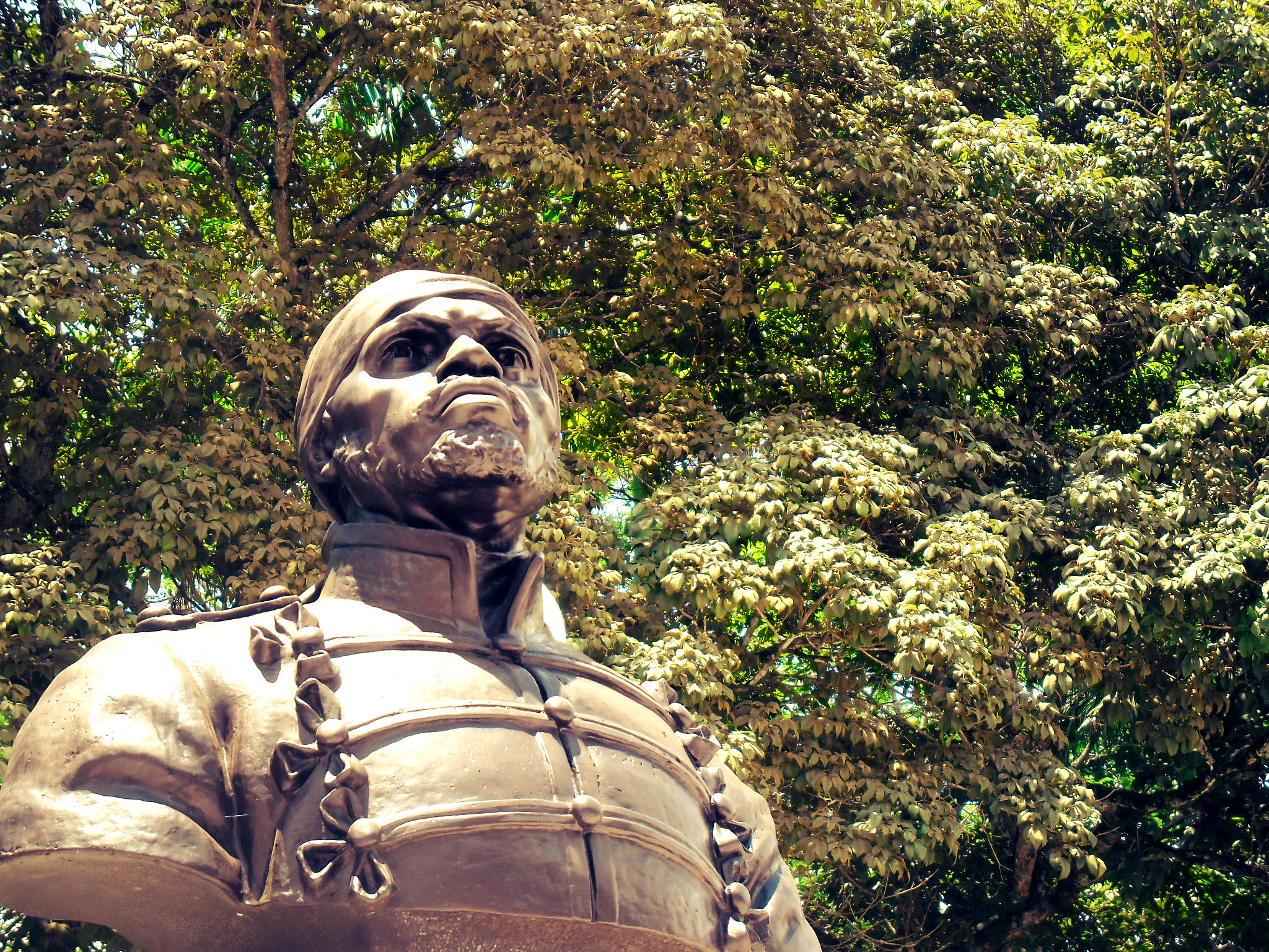 Busto del Negro Primero